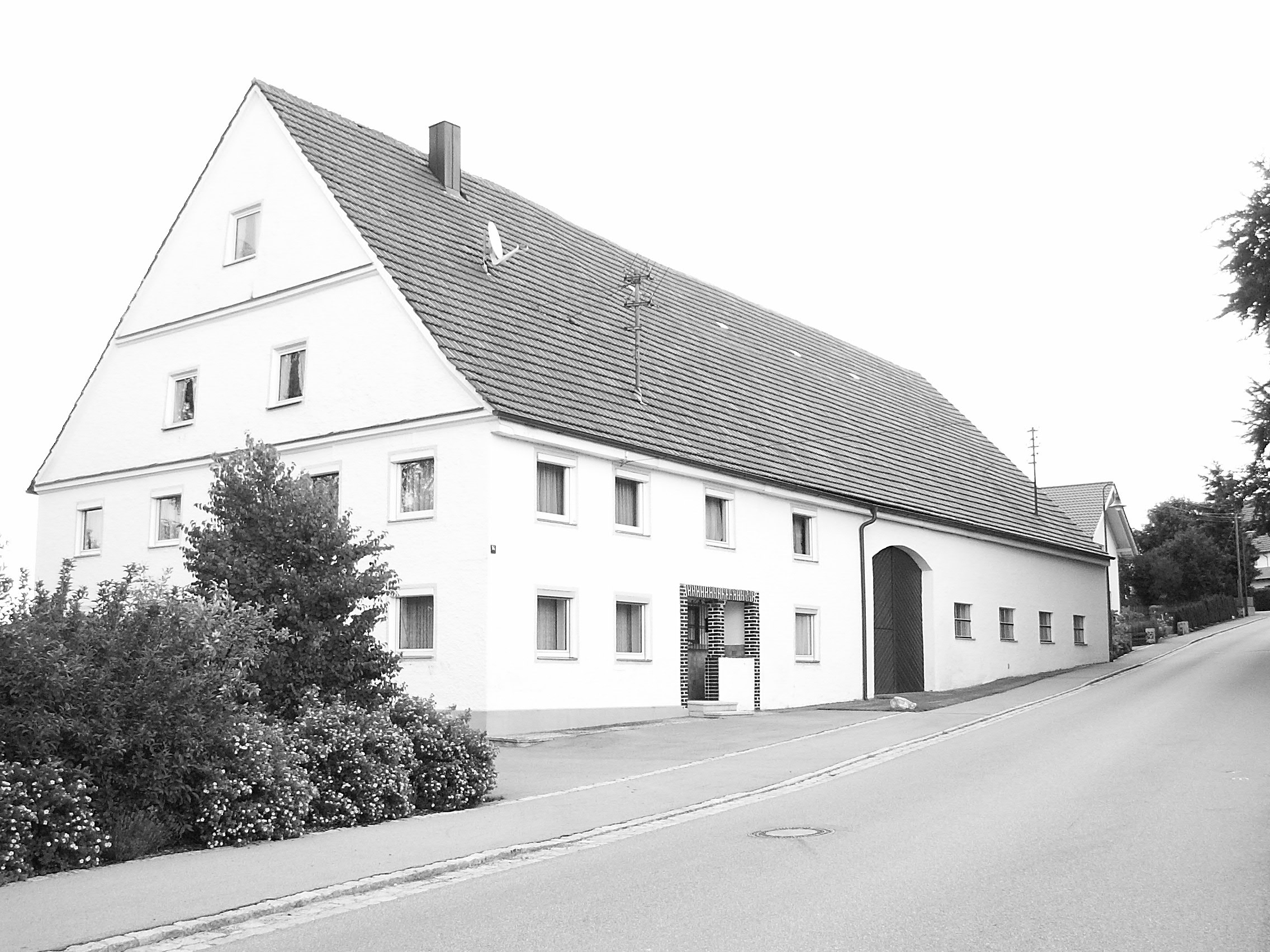 Hauptstr. 14 in Holzgünz